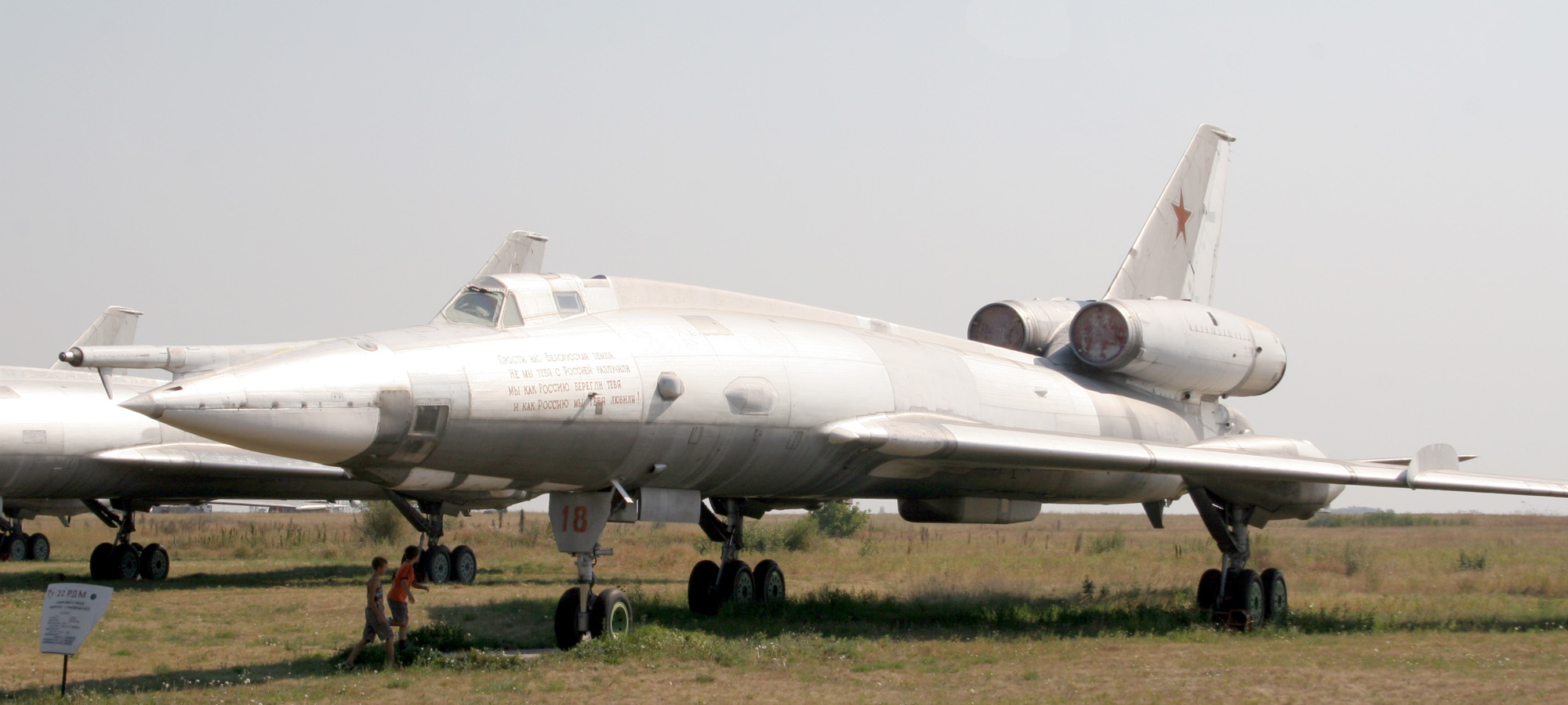 Самолёт Ту-22РДМ бортовой номер 18. Экспонат музея дальней авиации на авиабазе Энгельс